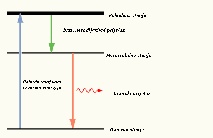 Trostupanjski laser.